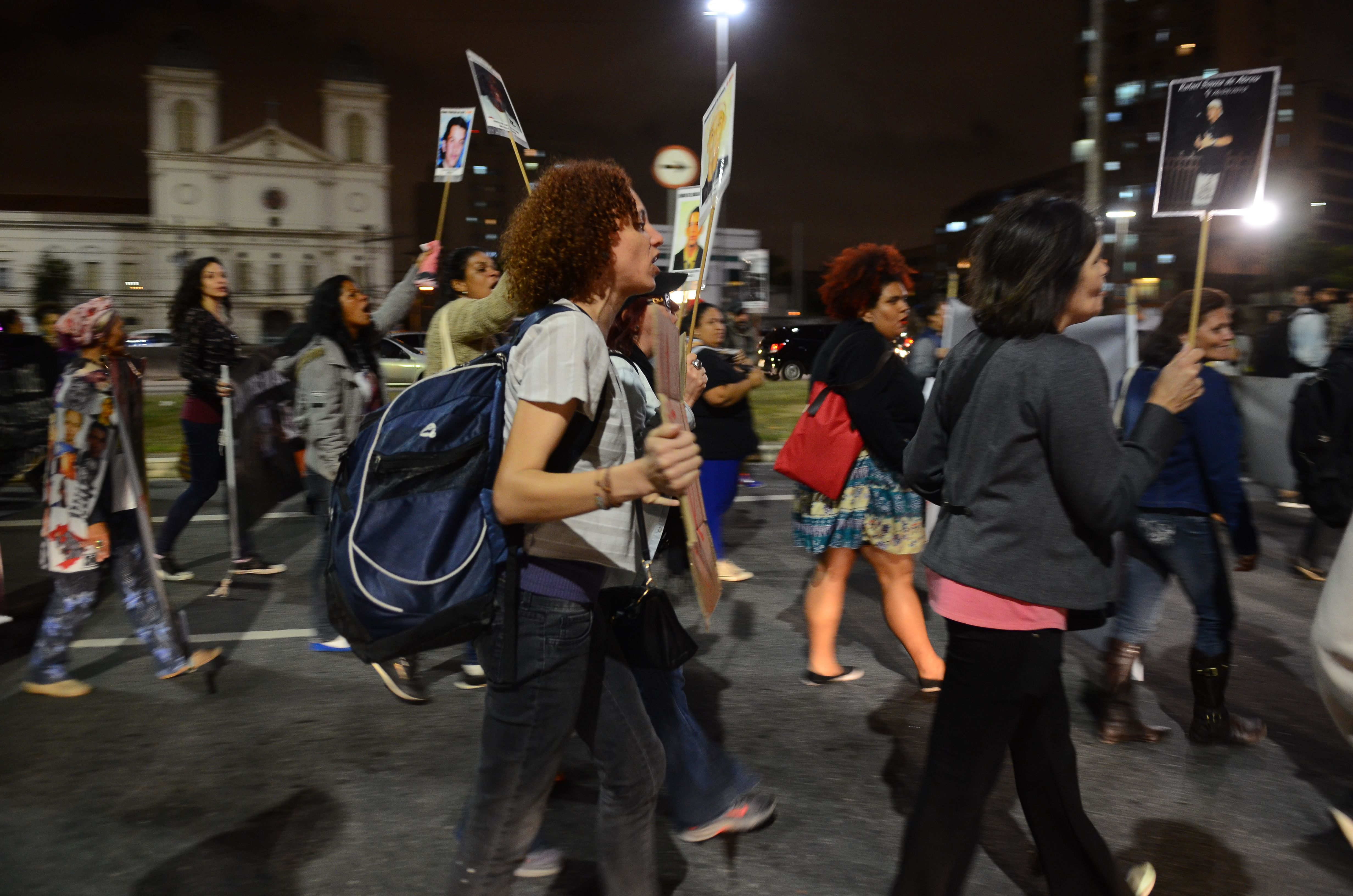 Manifestantes fazem de lembraça aos 111 mortos no massacre do Carandiru